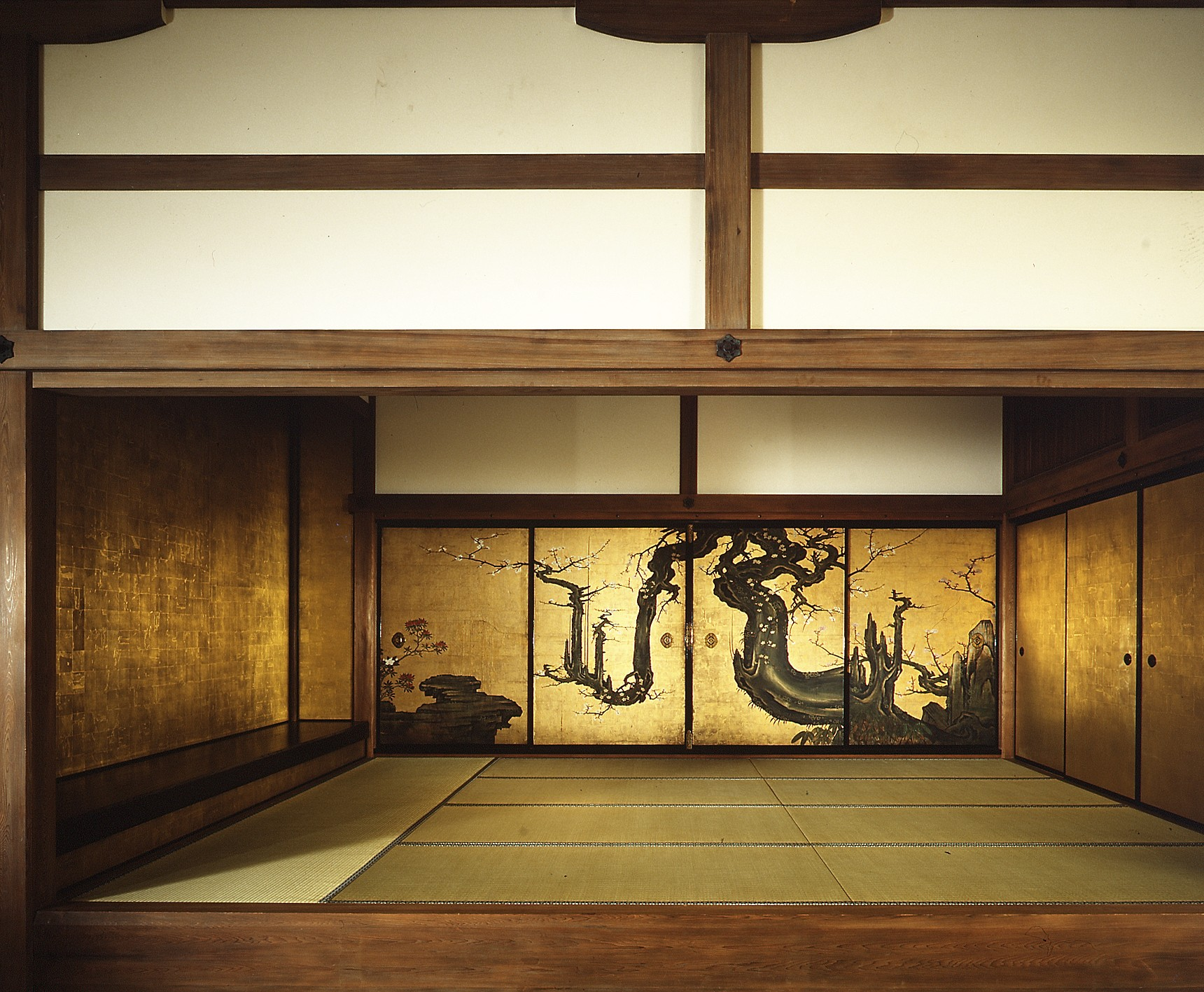 Japan; Door panels; Paintings